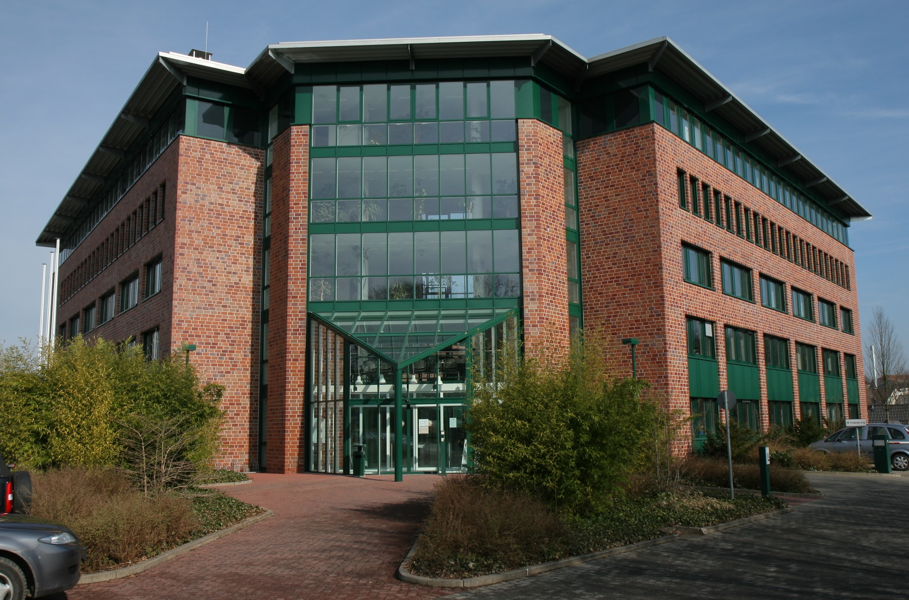 Gebäude des Finanzamtes in Lüdenscheid.